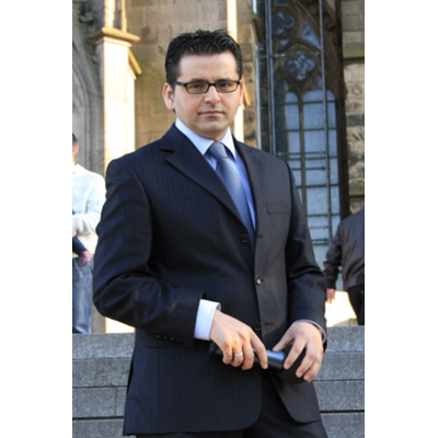 Hasan Aka im Jahr 2013 (Privat Foto)